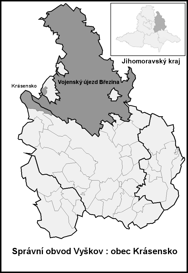 Hranice Krásensko (Vyškov- Czech republic)